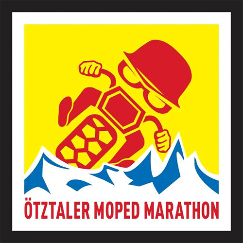 Logo des Ötztaler Mopedmarathons